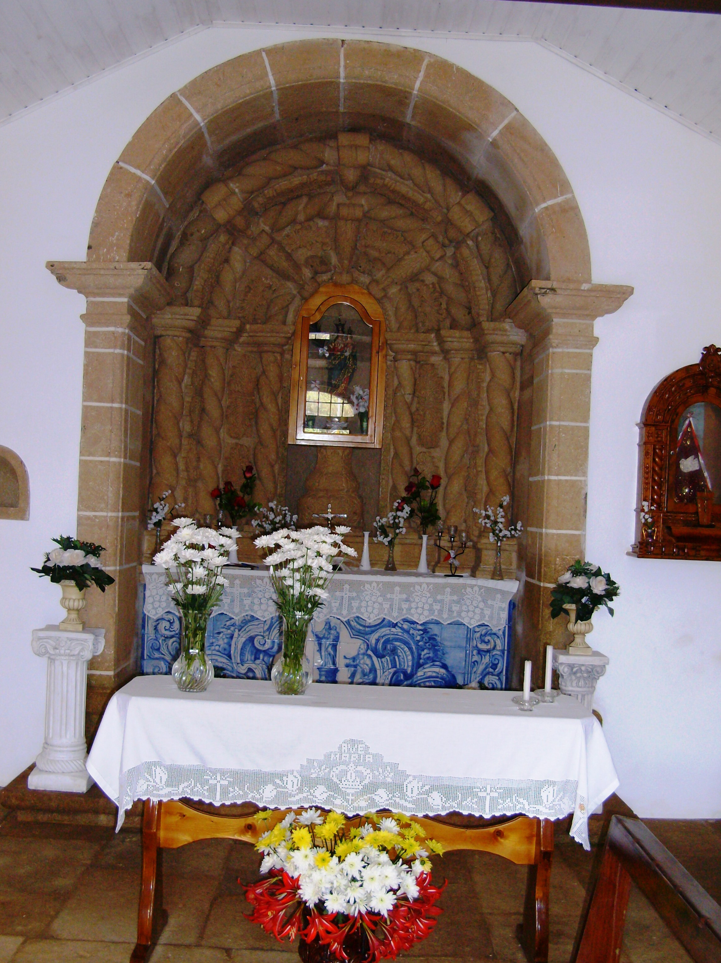 Ermida de Nossa Senhora do Pilar, Ilha de Santa Maria (Açores), Portugal.